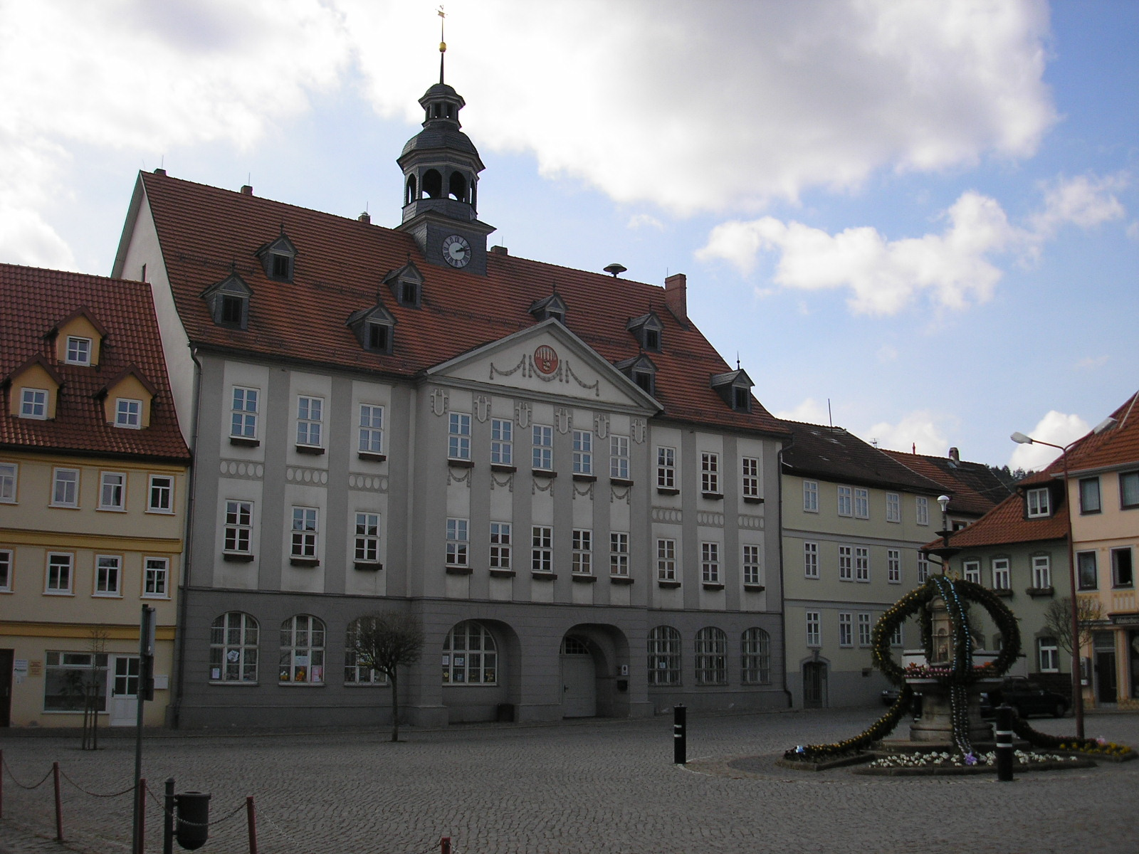 Das Rathaus von Themar (Thüringen).